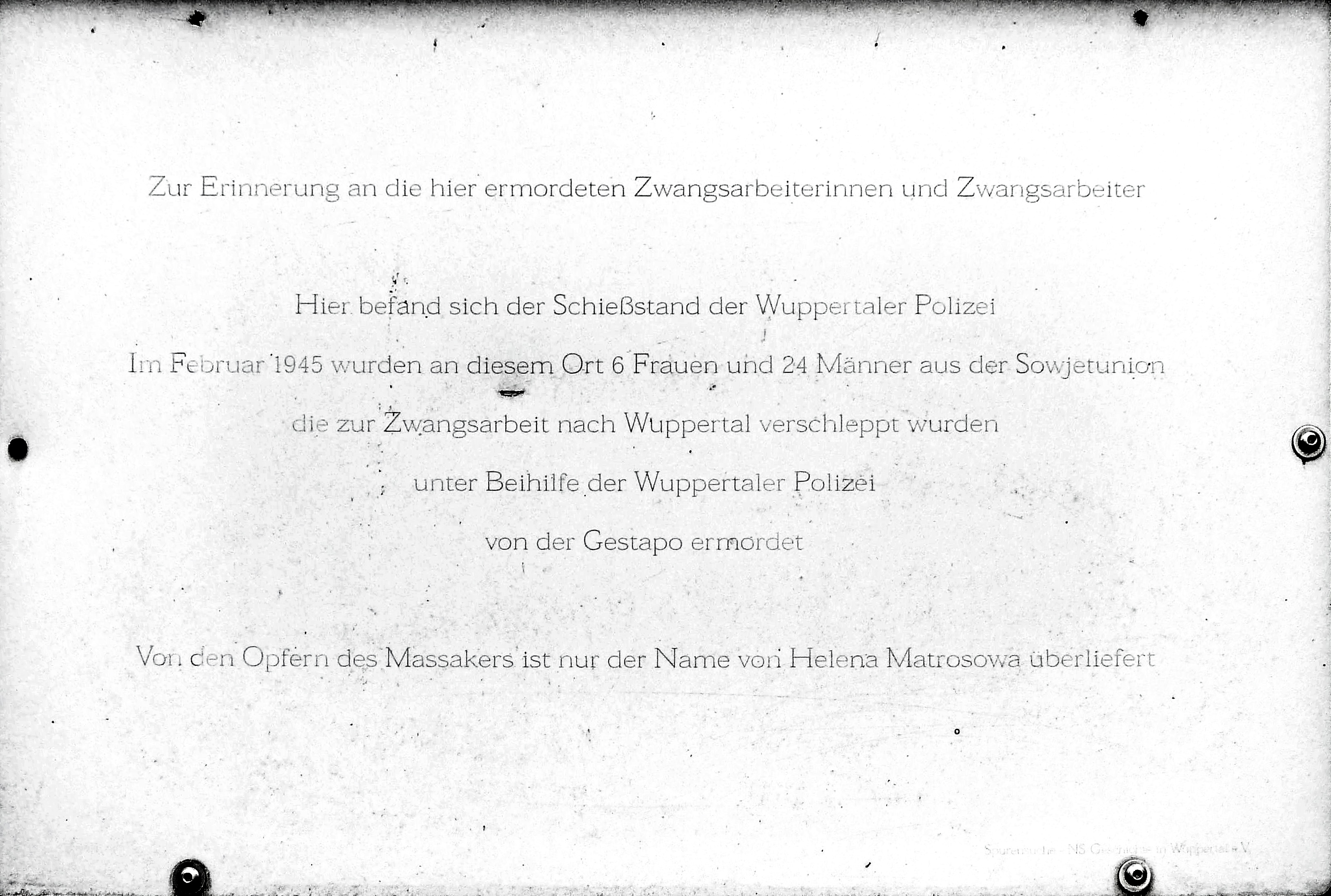 Gedenktafel an das Endphaseverbrechen am Gelände des ehemaligen Schießstands auf dem Burggrafenberg im Staatsforst Burgholz in Wuppertal